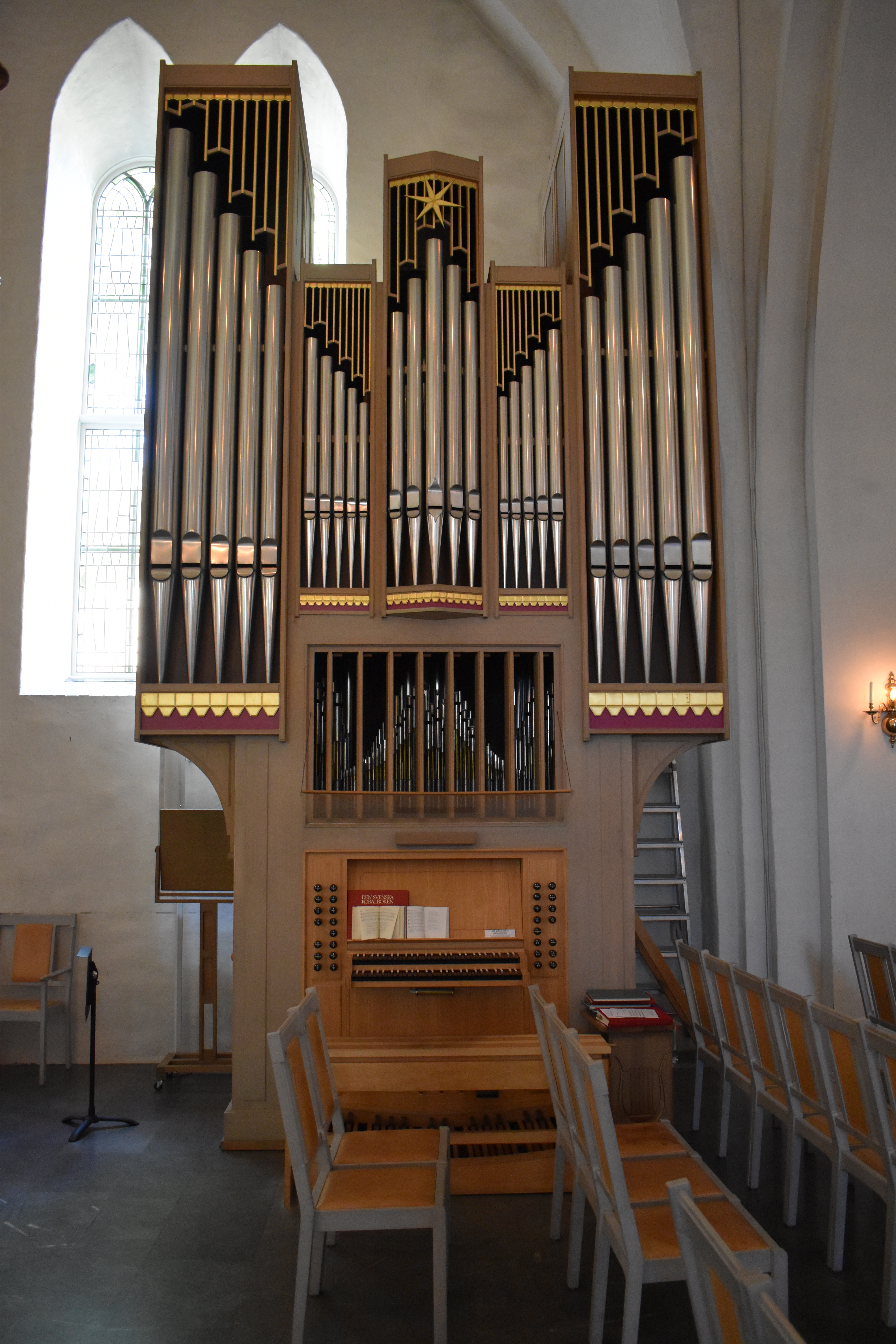 Mindre orgel i Växjö domkyrka (Domkyrkan 1)